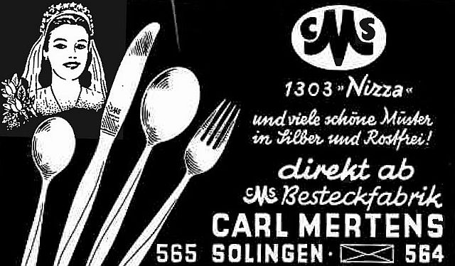 Alte Werbeanzeige CMS